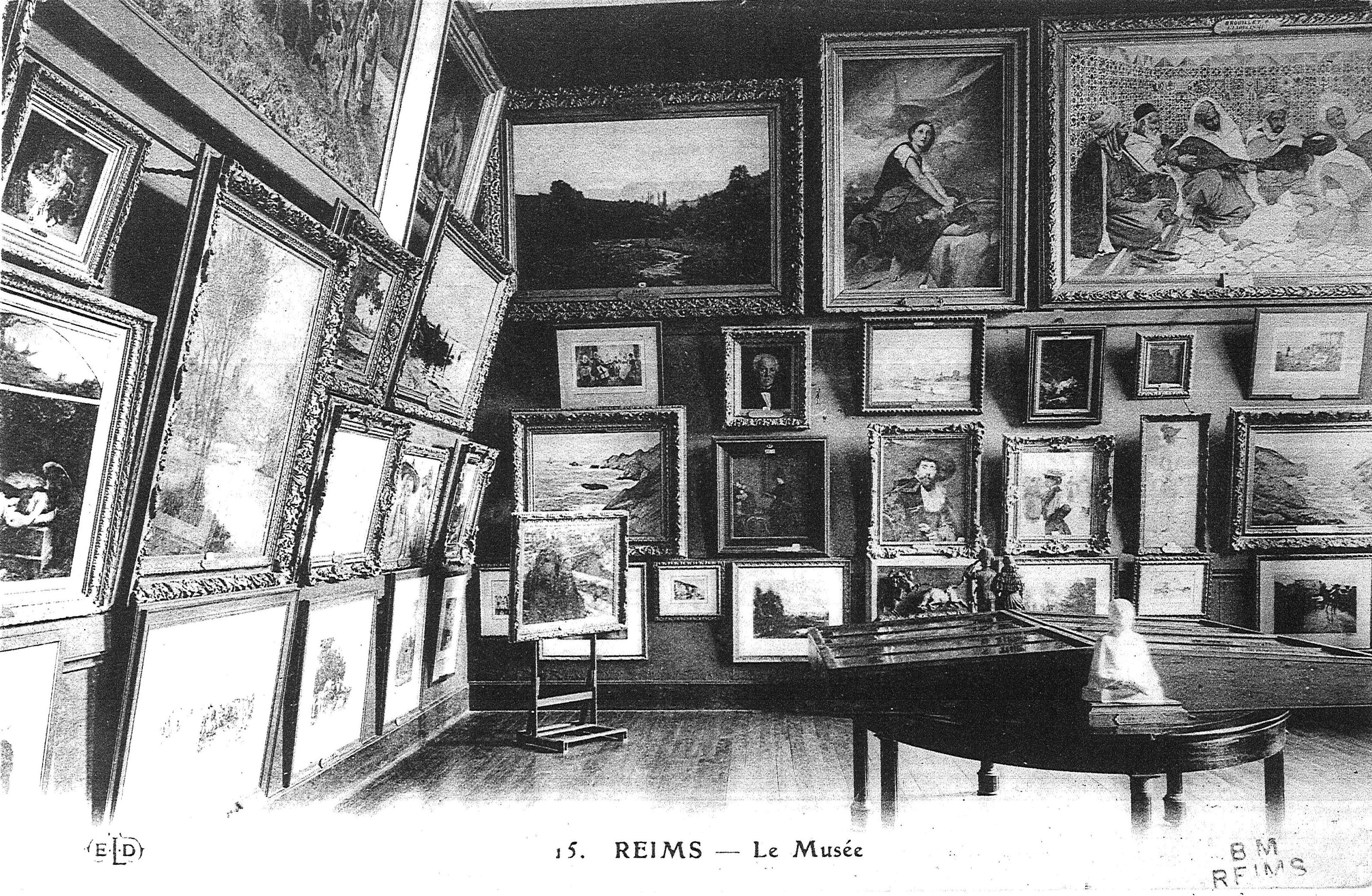 ancienne salle de la Mairie de Reims.